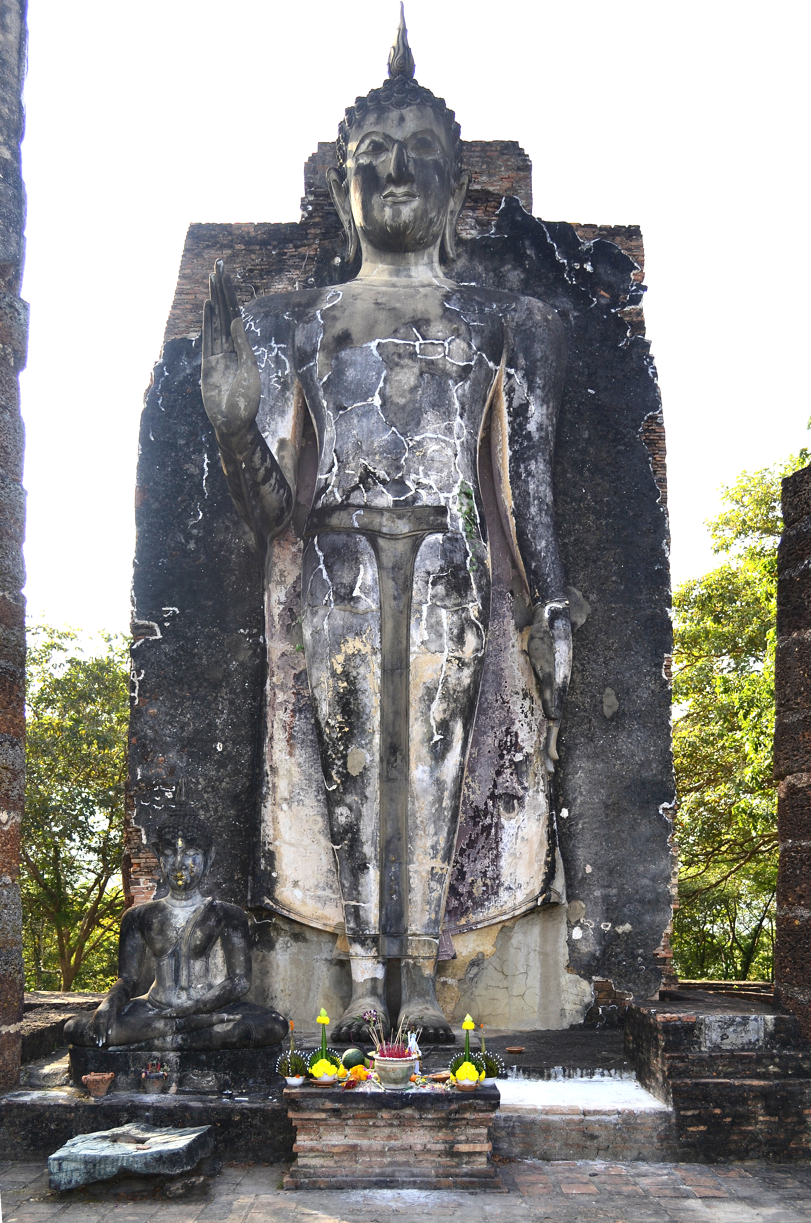 Wat Saphan Hin im Geschichtspark Sukhothai